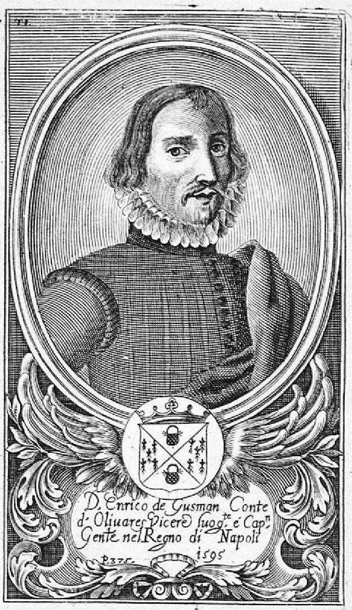 Enrique de Guzmán. Grabado calcográfico anónimo recogido en Teatro eroico, e politico de'governi de'Vicere del Regno de Napoli, de Domenico Antonio Parrino, Nápoles, 1692-1695. Biblioteca Nacional de España